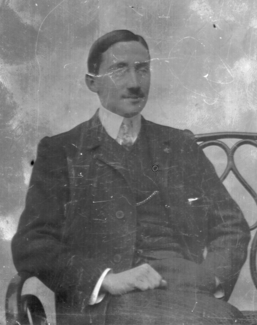 Retrato